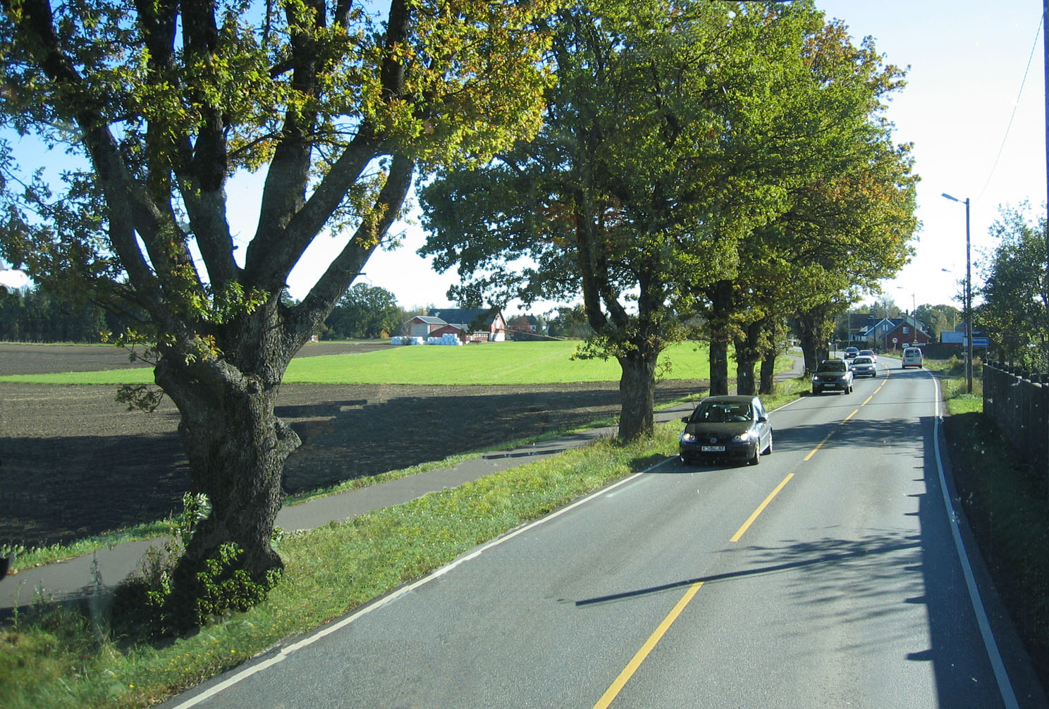 Hortensveien, riksvei 19